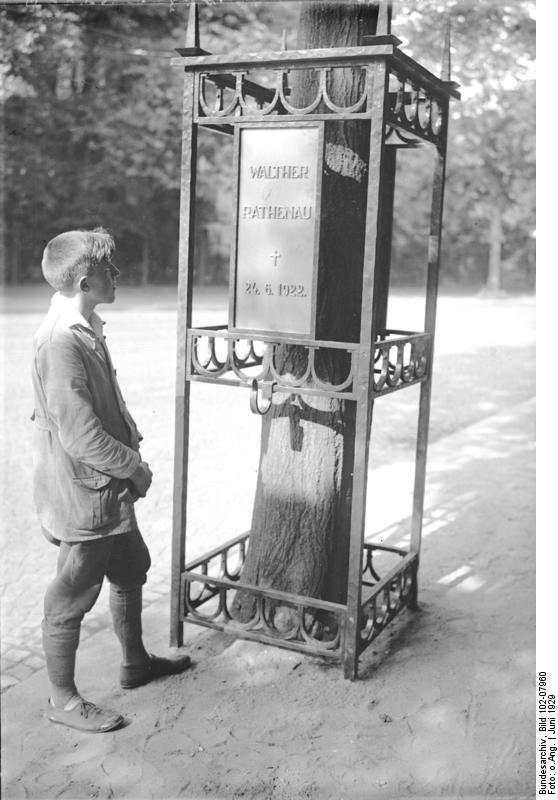 Eine Walter Rathenau Gedenktafel an der Mordstelle in der Königsallee in Berlin Grunewald! An der Stelle wo der ehemalige Reichsaussenminister Walter Rathenau ermordet wurde, ist eine Gedenktafel errichtet worden. Unser Bild zeigt die Gedenktafel Walter Rathenau in der Königsallee in Berlin Grunewald.